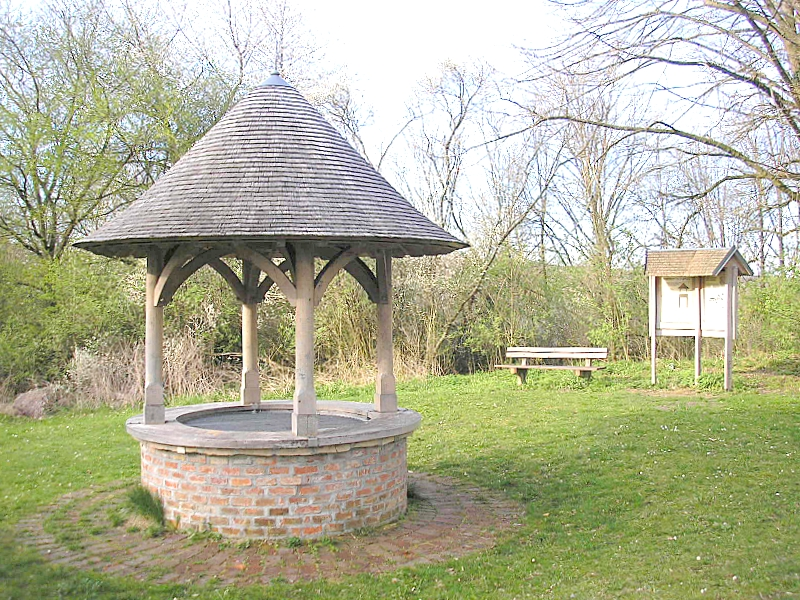 Burg Zusameck über Dinkelscherben (Landkreis Augsburg, Bayerisch-Schwaben). Der rekonstruierte Burgbrunnen auf dem Vorburgplateau. Eigene Aufnahme, April 2008 / Zusameck castle (Dinkelscherben, Bavaria, Germany). The reconstructed well at the bailey. Own photo, April 2008